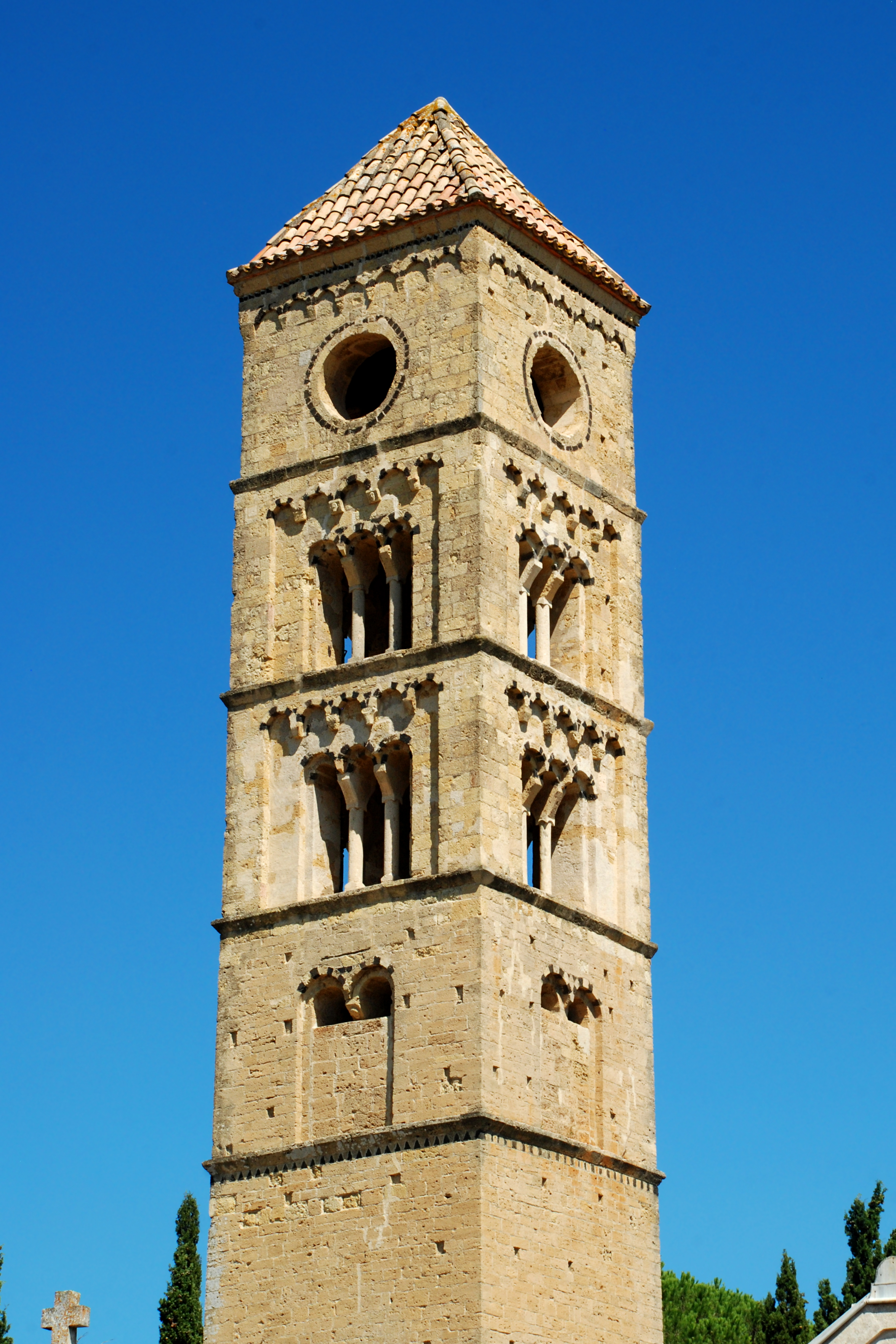 France - Languedoc - Hérault - Puissalicon - ancienne église Saint-Étienne de Pezan - tour romane .